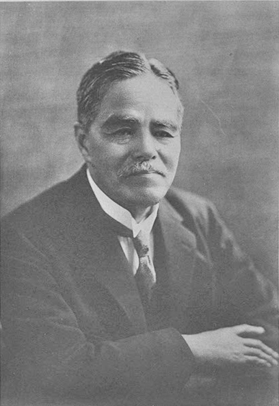 内村鑑三(Uchimura Kanzo,1861-1930)